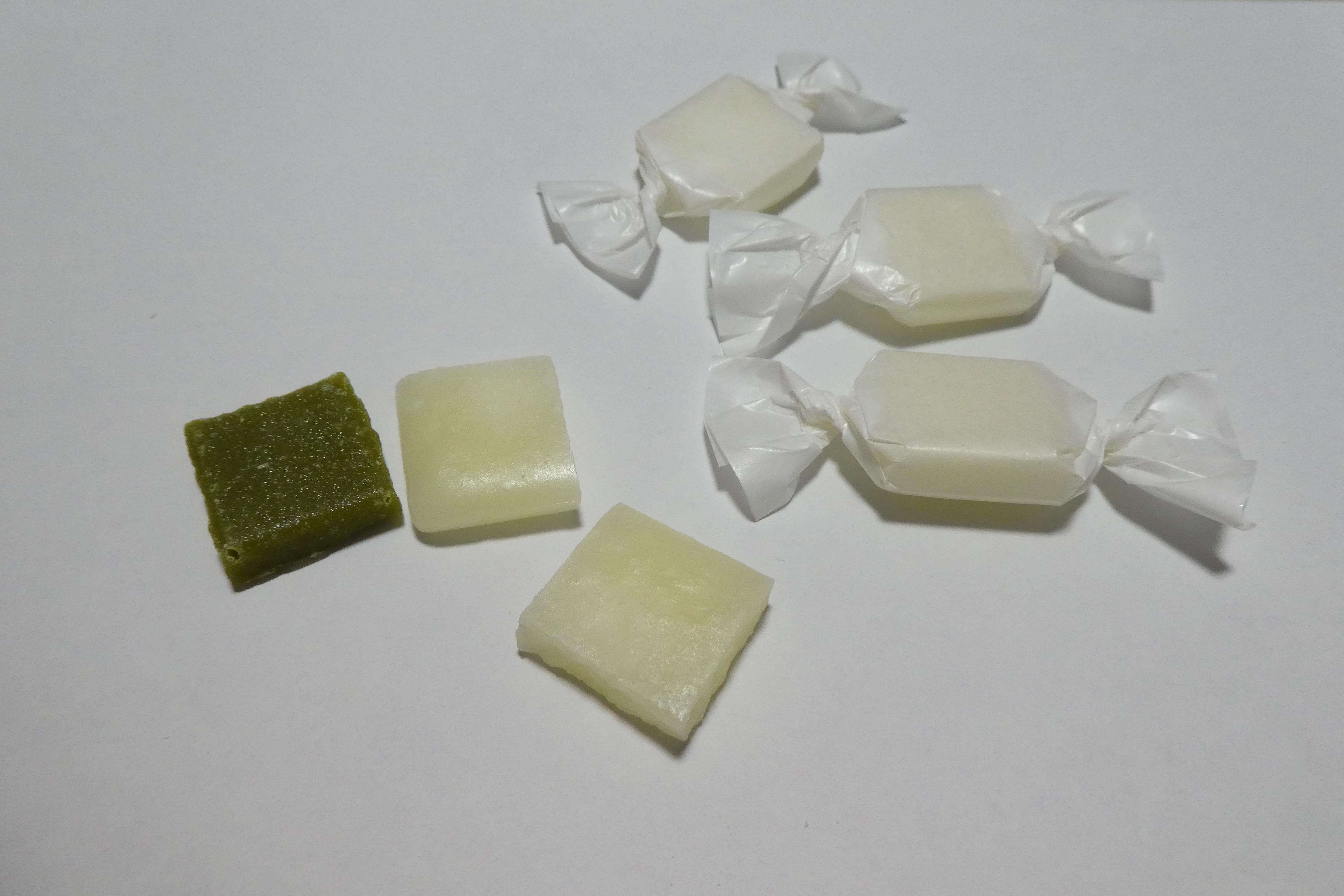 出雲市平田、來間屋の生姜糖